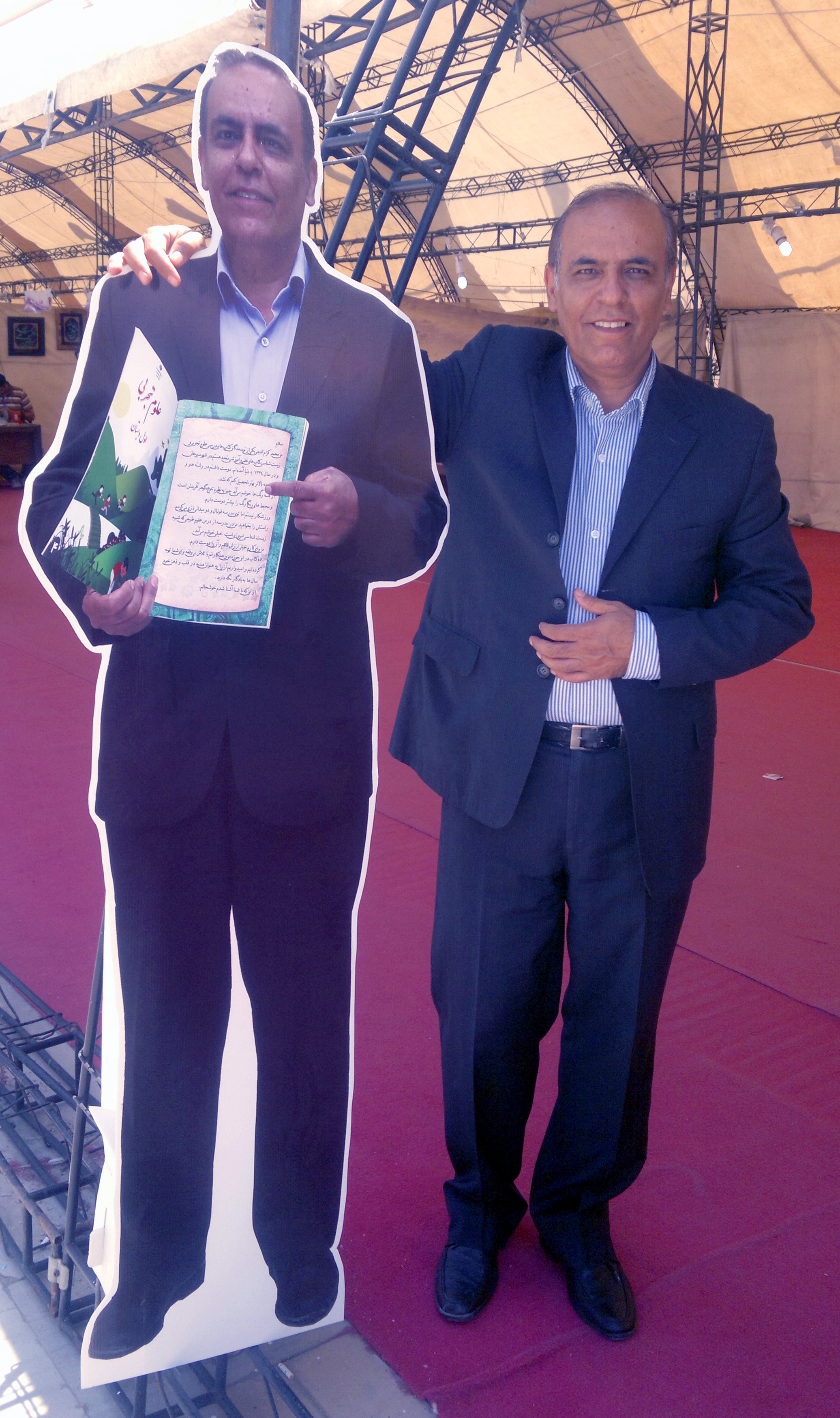 محمد کرام‌الدینی در کنار تابلوی ایستادهٔ خود غرفهٔ «نام‌های آشنا، چهره‌های ناآشنا» در بیست و هفتمین نمایشگاه بین‌المللی کتاب تهران، اردیبهشت ۱۳۹۳، تهران.